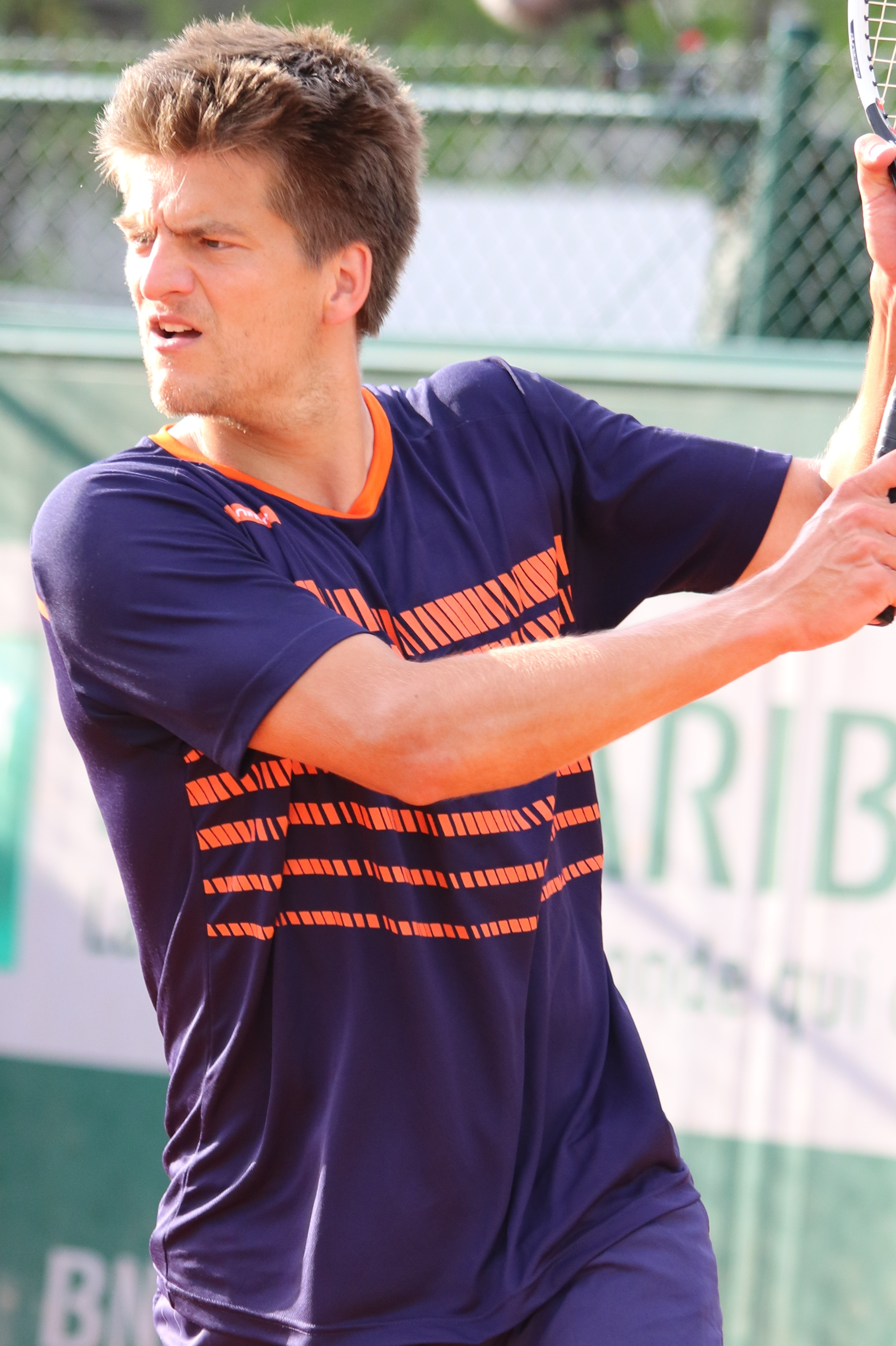 Arends RG18 (29)